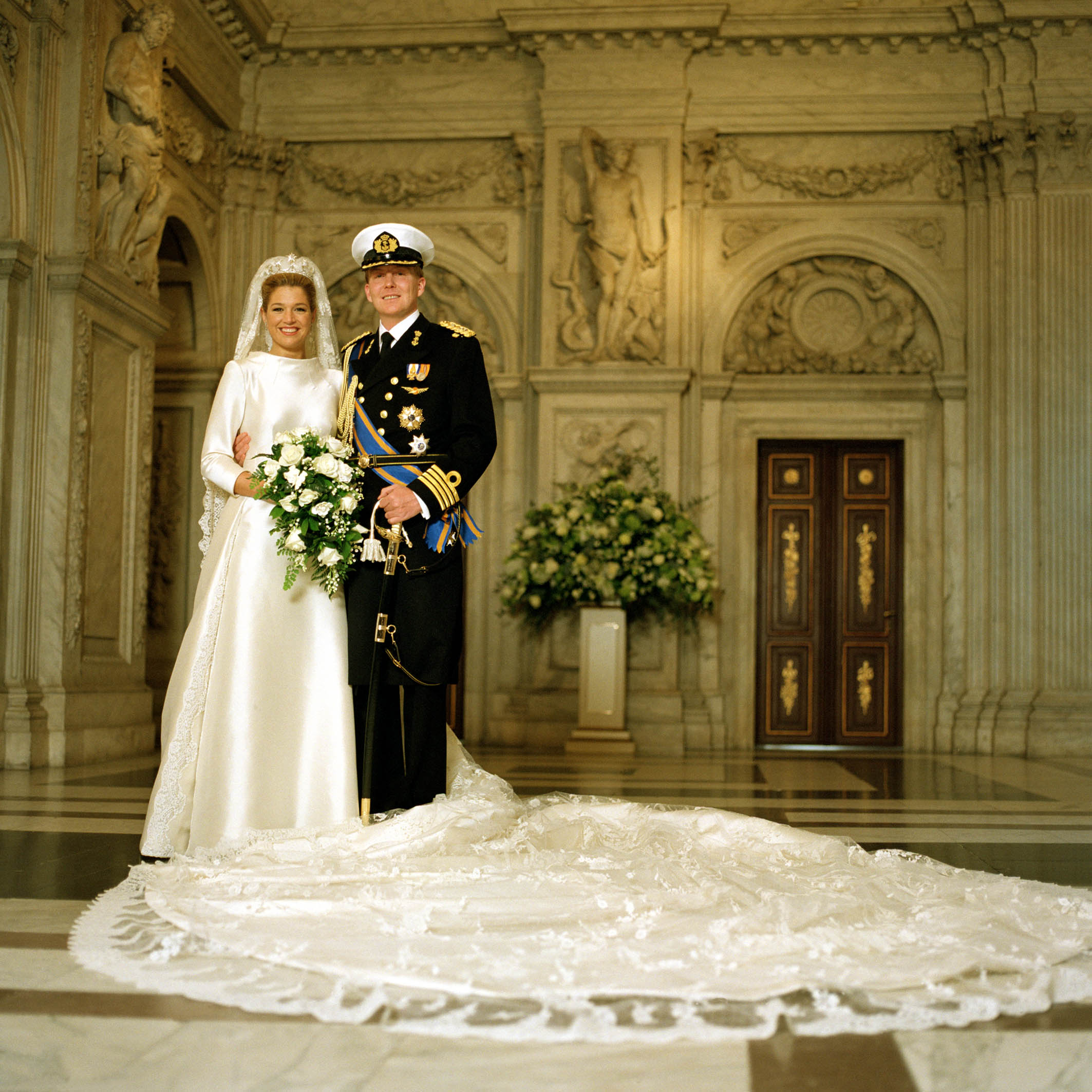 Huwelijksportret van de Prins van Oranje en Prinses Máxima.